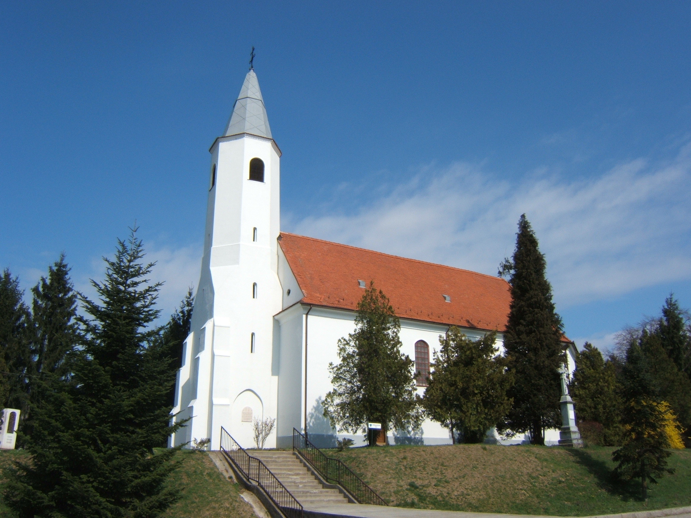 Csurgó, Szentlélek-templom. A középkori eredetű Szentlélek-templom a Somogy megyei Csurgó egyik műemléke. A város északi részén, a településen áthaladó utak kereszteződésében egy kis dombon áll.